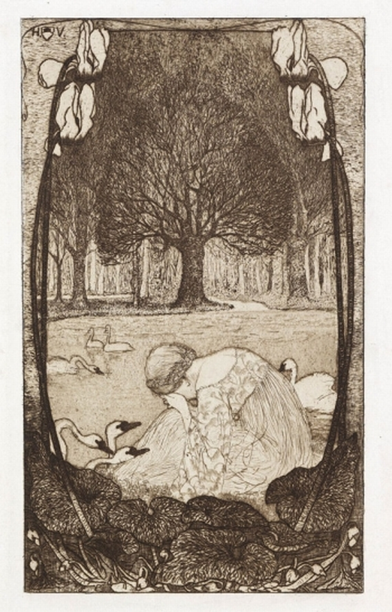 Die sieben Schwäne. 1898, Radierung und Aquatinta.